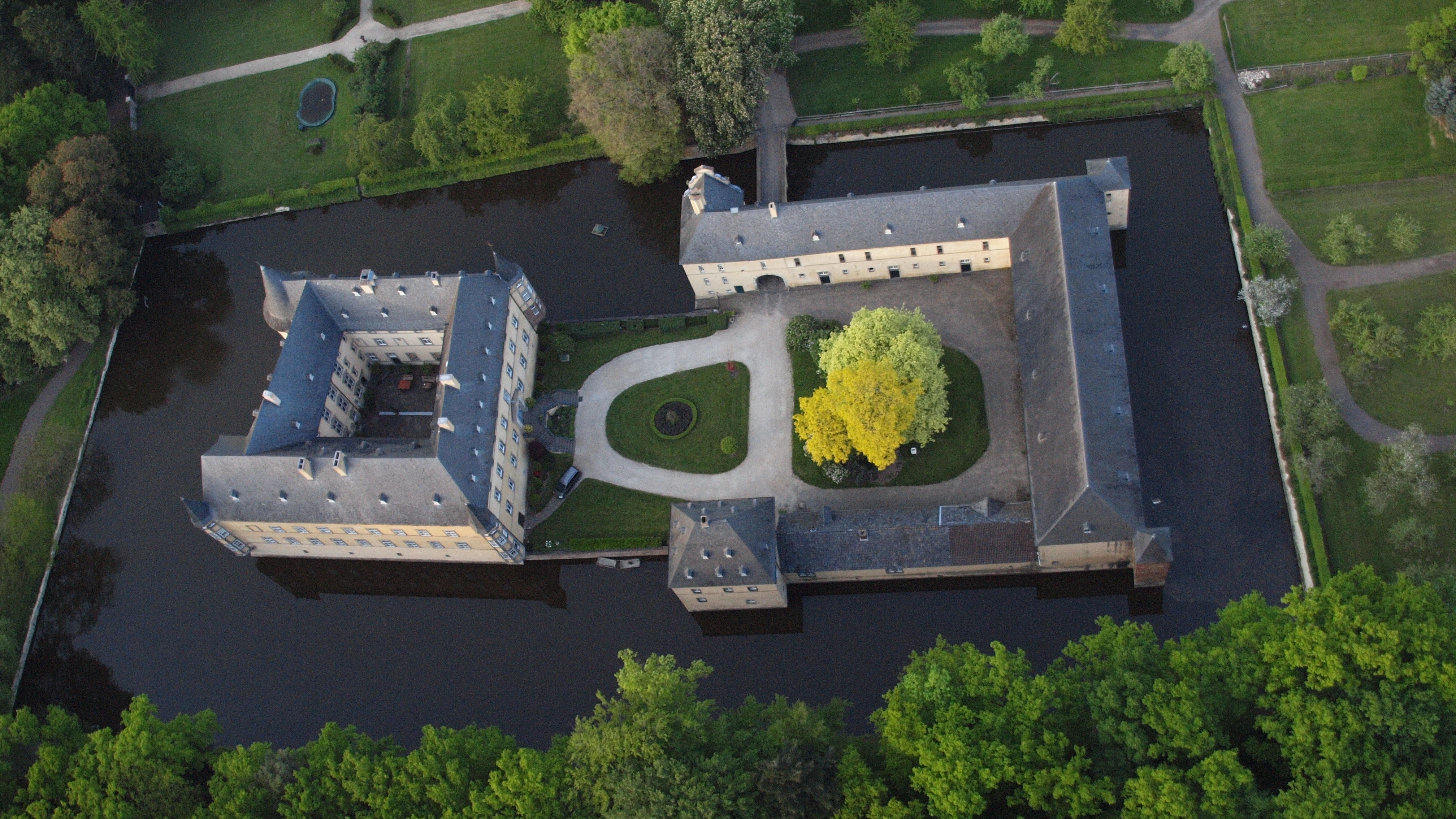 Burg Adendorf in Adendorf: Luftaufnahme